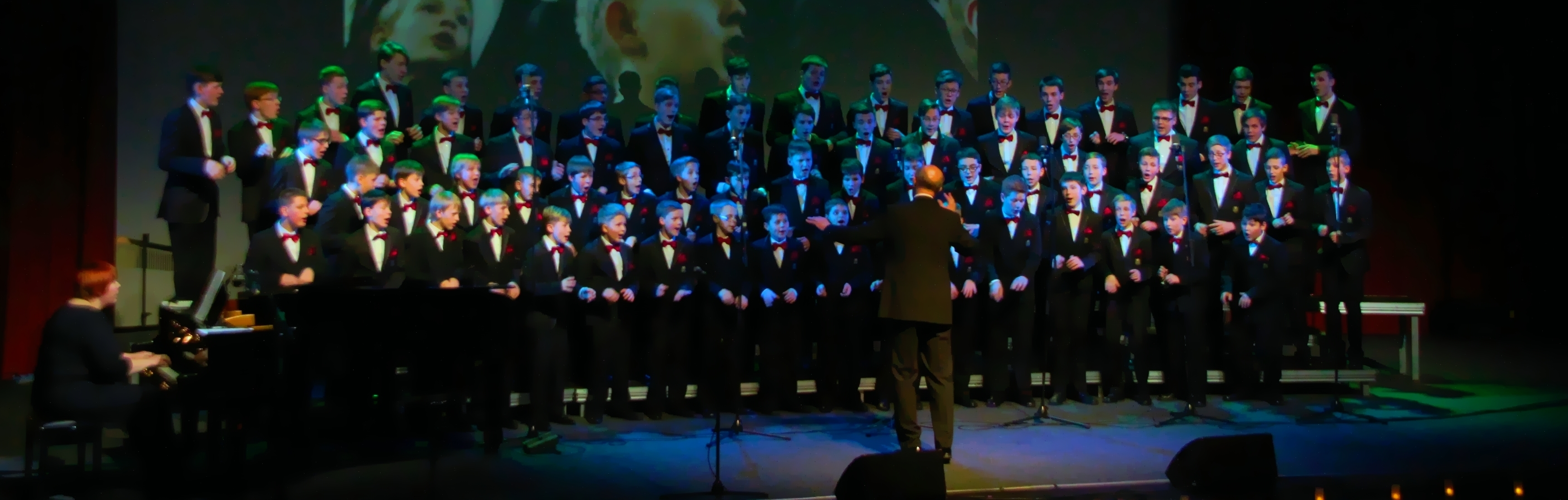 2014 m. gruodžio 17 d. Šiaulių koncertų salėje „Saulė“ įvyko berniukų ir jaunuolių choro „Dagilėlis“ (meno vadovas ir dirigentas Remigijus Adomaitis, koncertmeisterė Daiva Šulcaitė) kompaktinio disko „Omnis Una Gaudeamus” pristatymo koncertas.